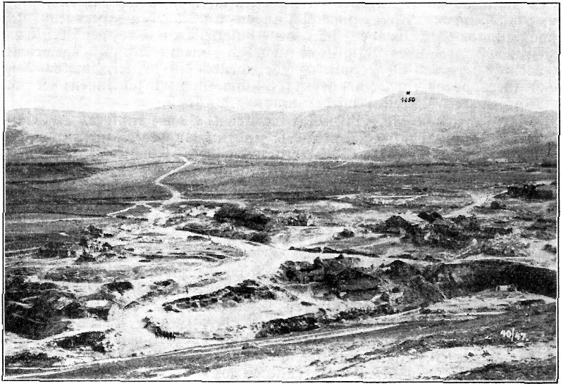 Crnicani, am Fuße der Höhe 1050